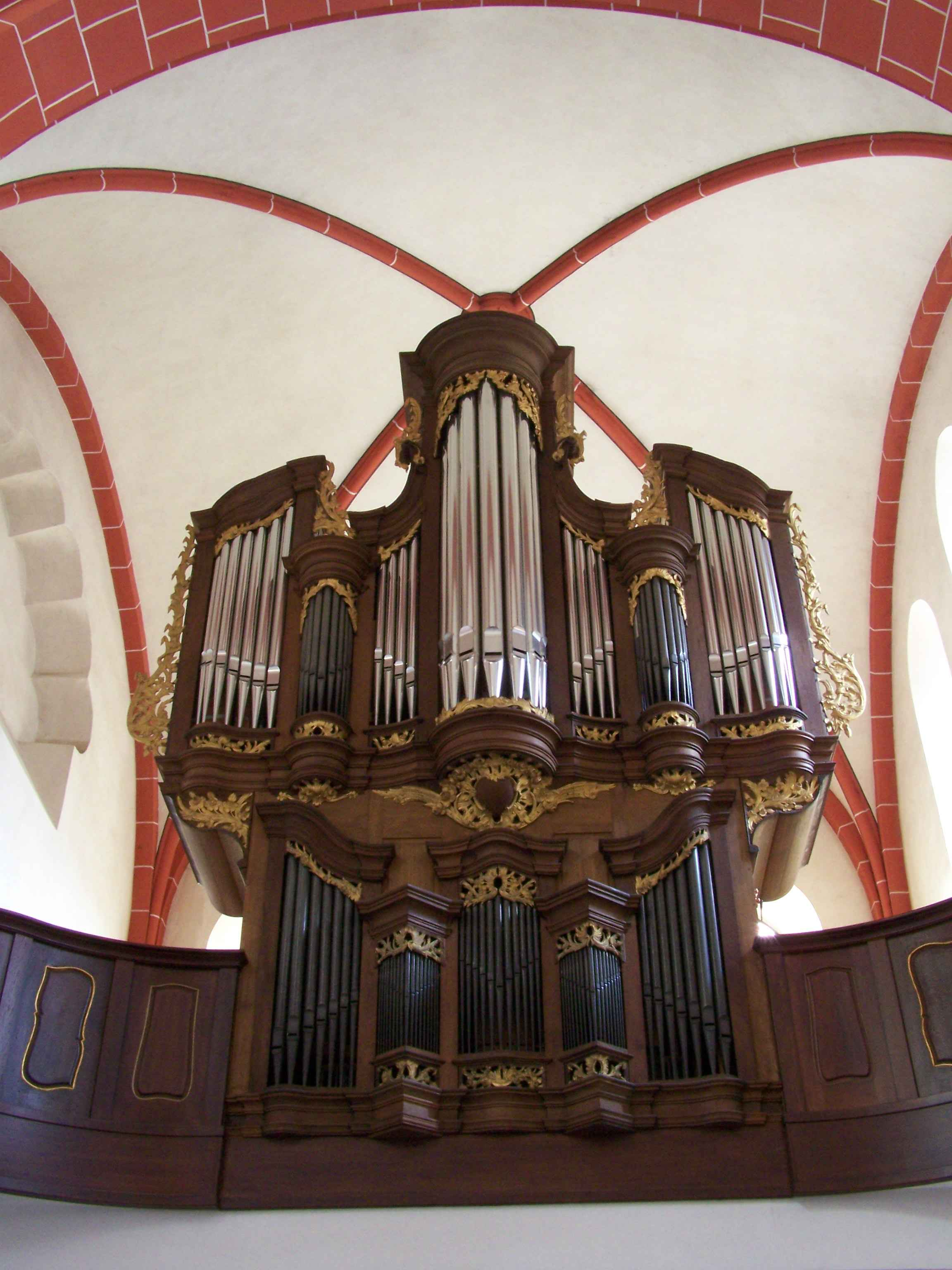 Stummorgel Abtei Sayn, nach der Restauration von 1996/97